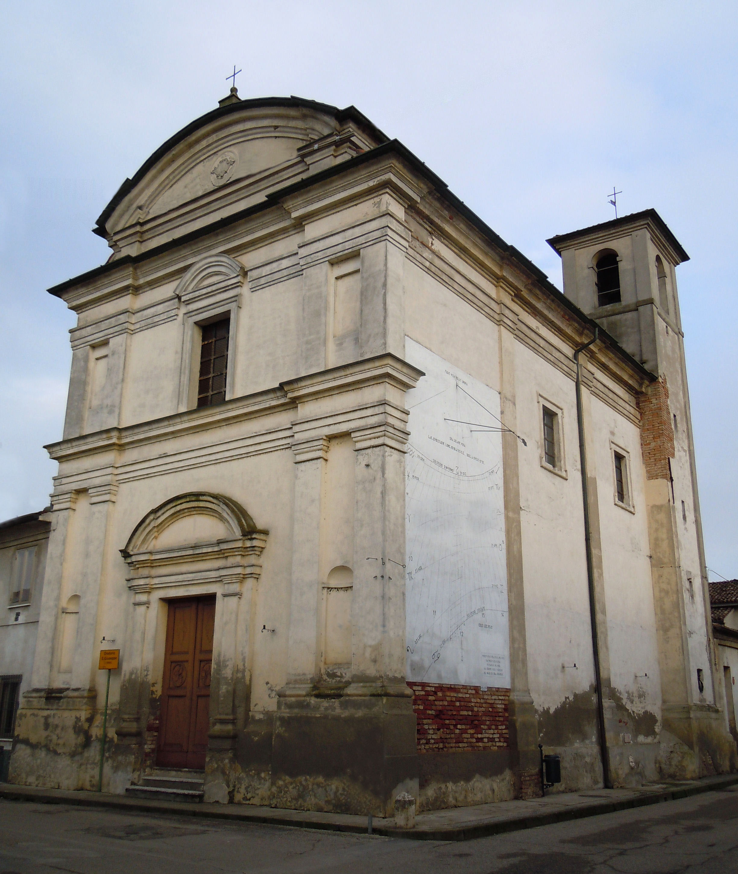 Isola Dovarese, Oratorio di S. Giuseppe.